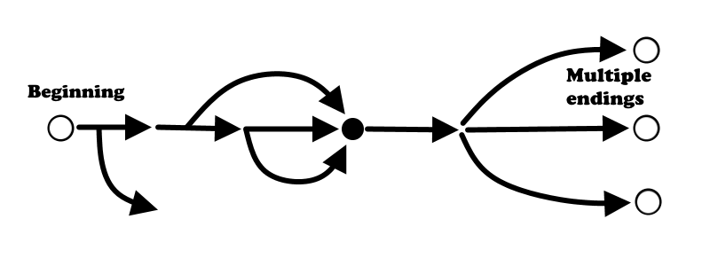 Разветвления сюжета нелинейной игры, изображенные графически